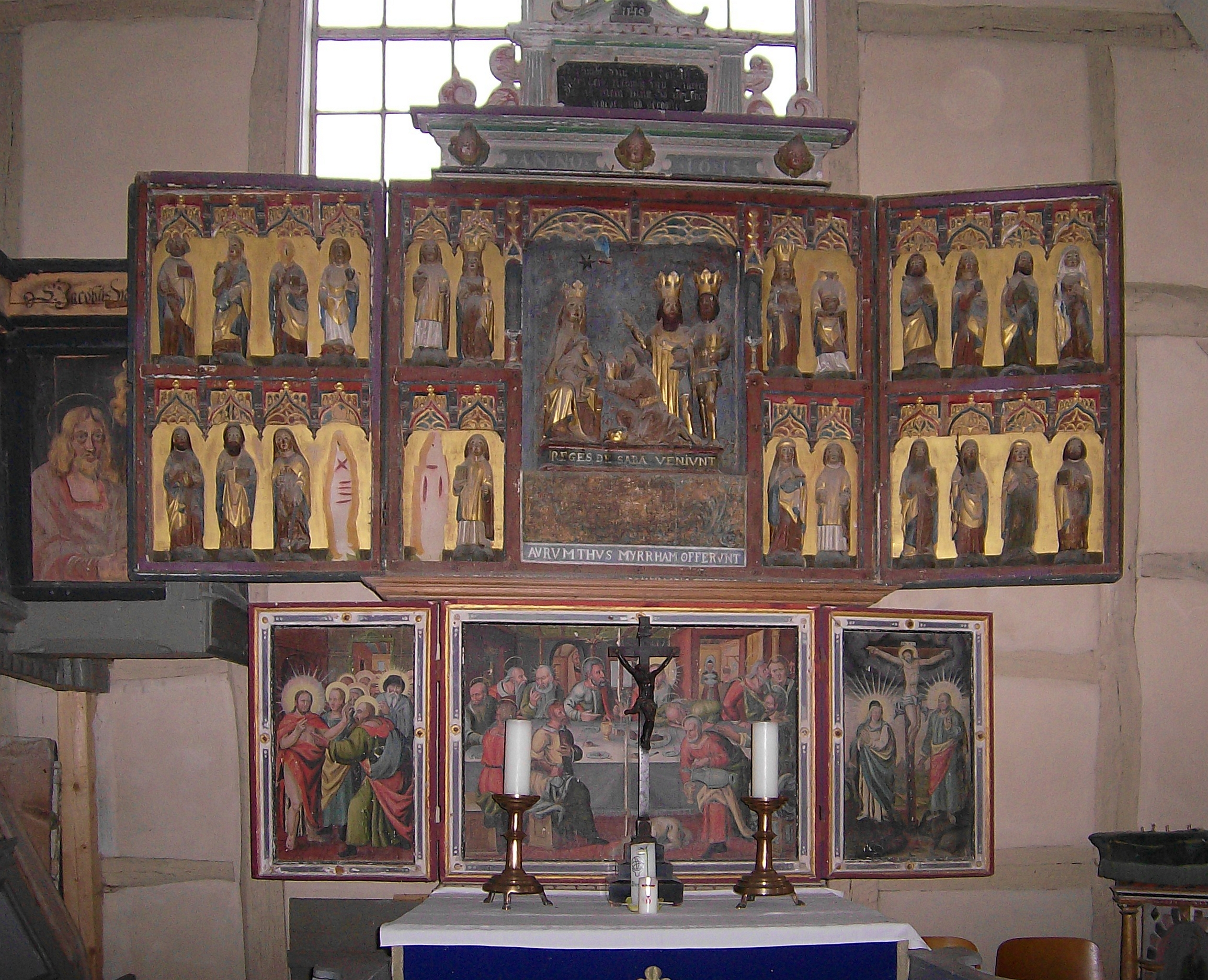 Kirche Wieserode, Flügelaltar